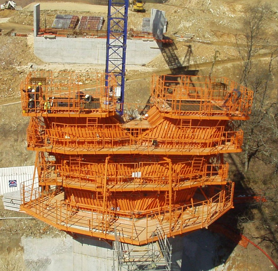 A89 - Viaduc de l'Elle - Coffrage du chevêtre de la pile P1